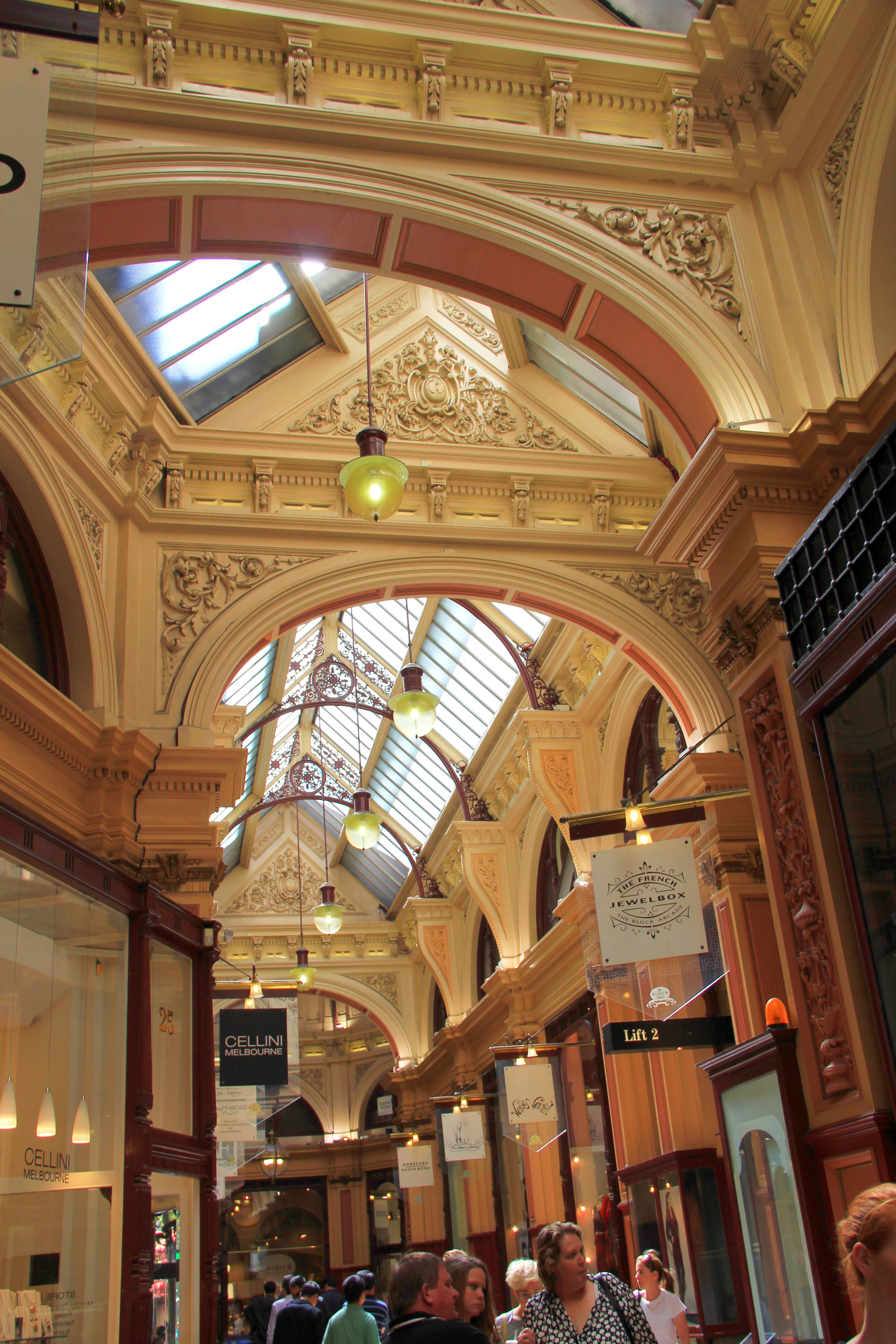 墨尔本